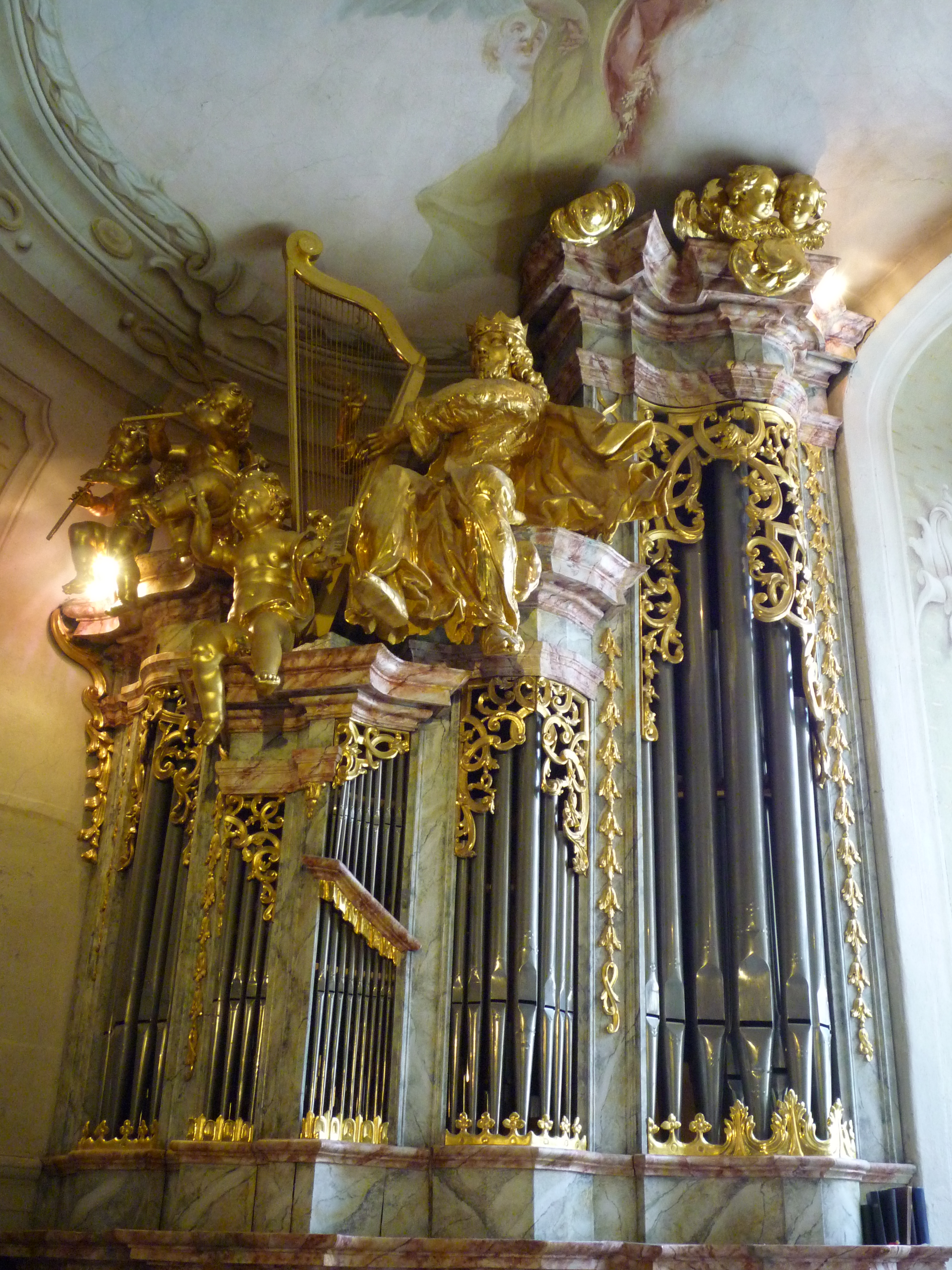 Linke Seite, sogenannte C-Seite, der Orgel der Stiftskirche Geras mit der Figur des harfespieldenden Königs David